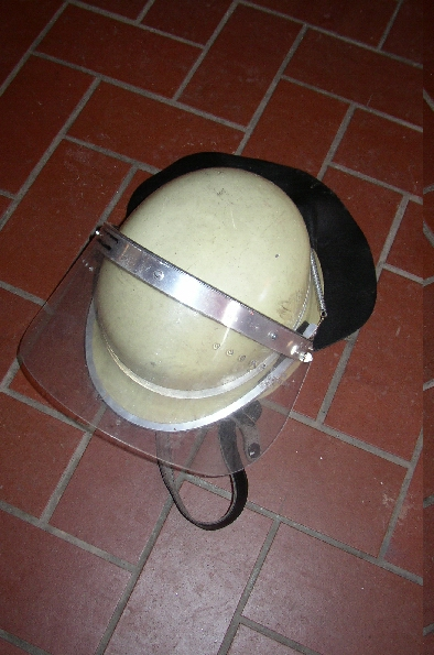 DIN Feuerwehrhelm